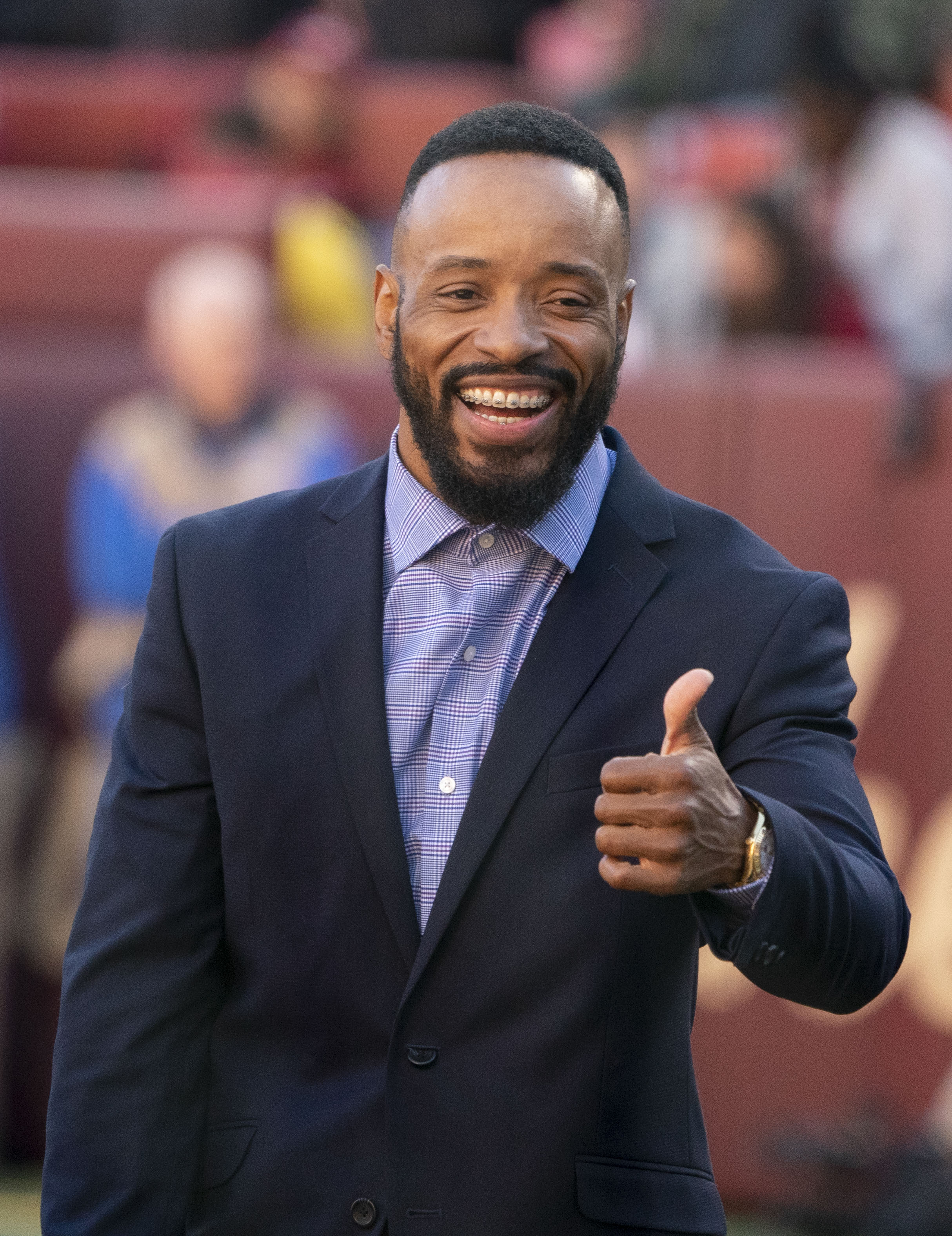 Falcons at Redskins 11/04/18